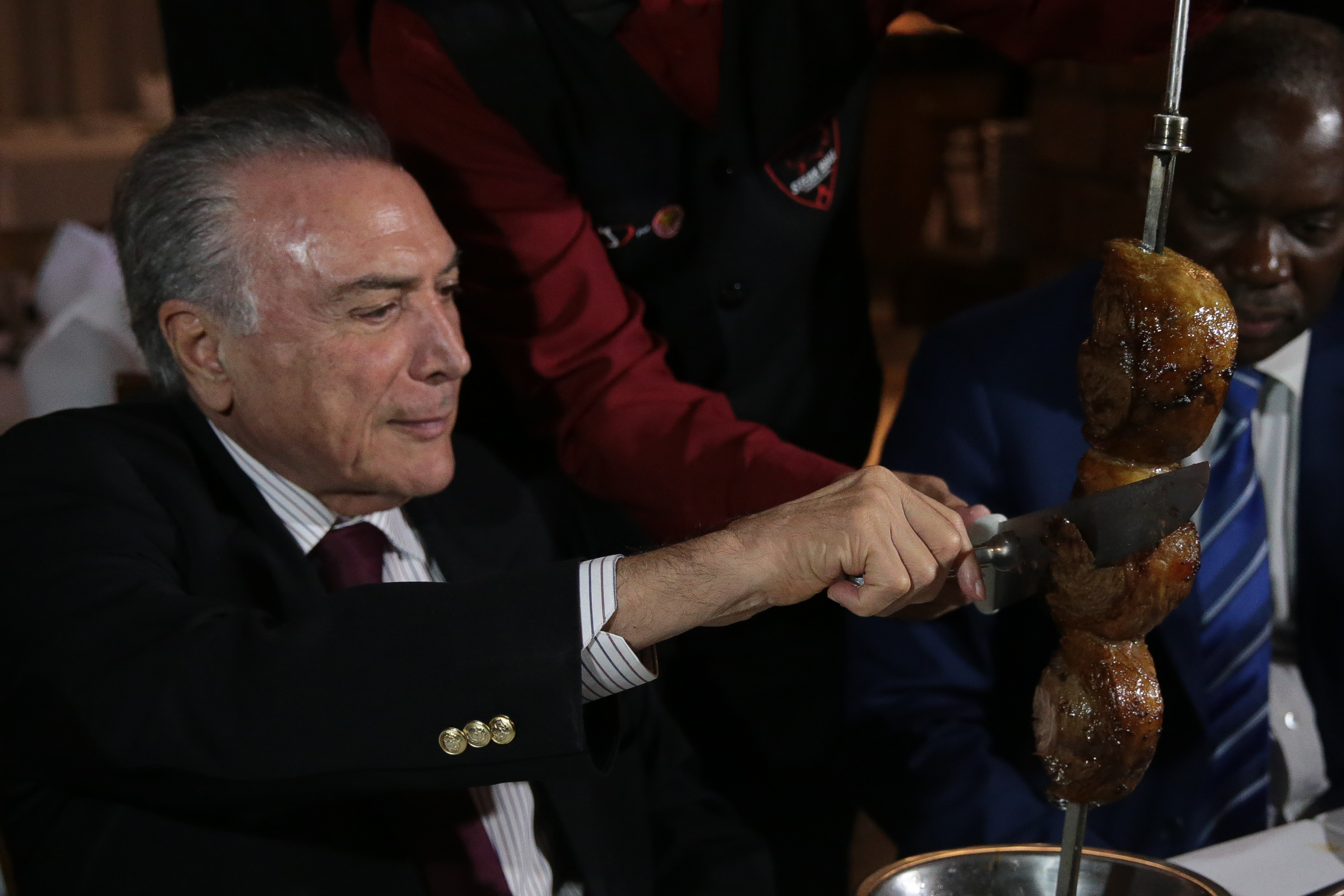 Brasília - Após reunião no palácio do Planalto, o presidente Michel Temer janta em churrascaria com ministros e embaixadores (José Cruz/Agência Brasil)